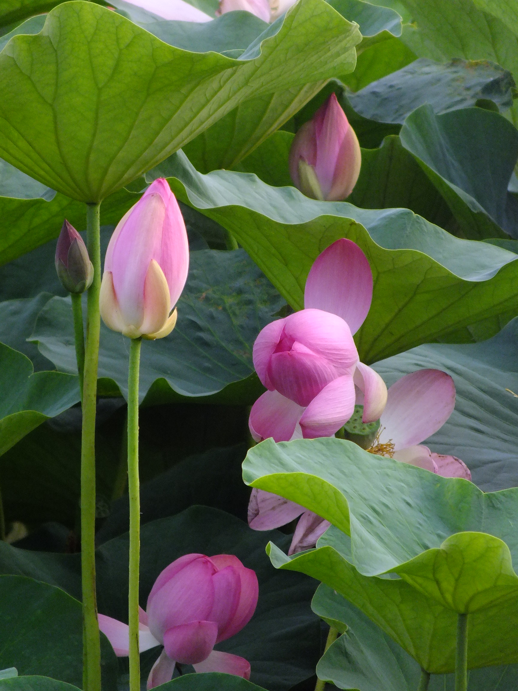 Hiraike-park (平池公園 大賀ハス)兵庫県加東市東古瀬